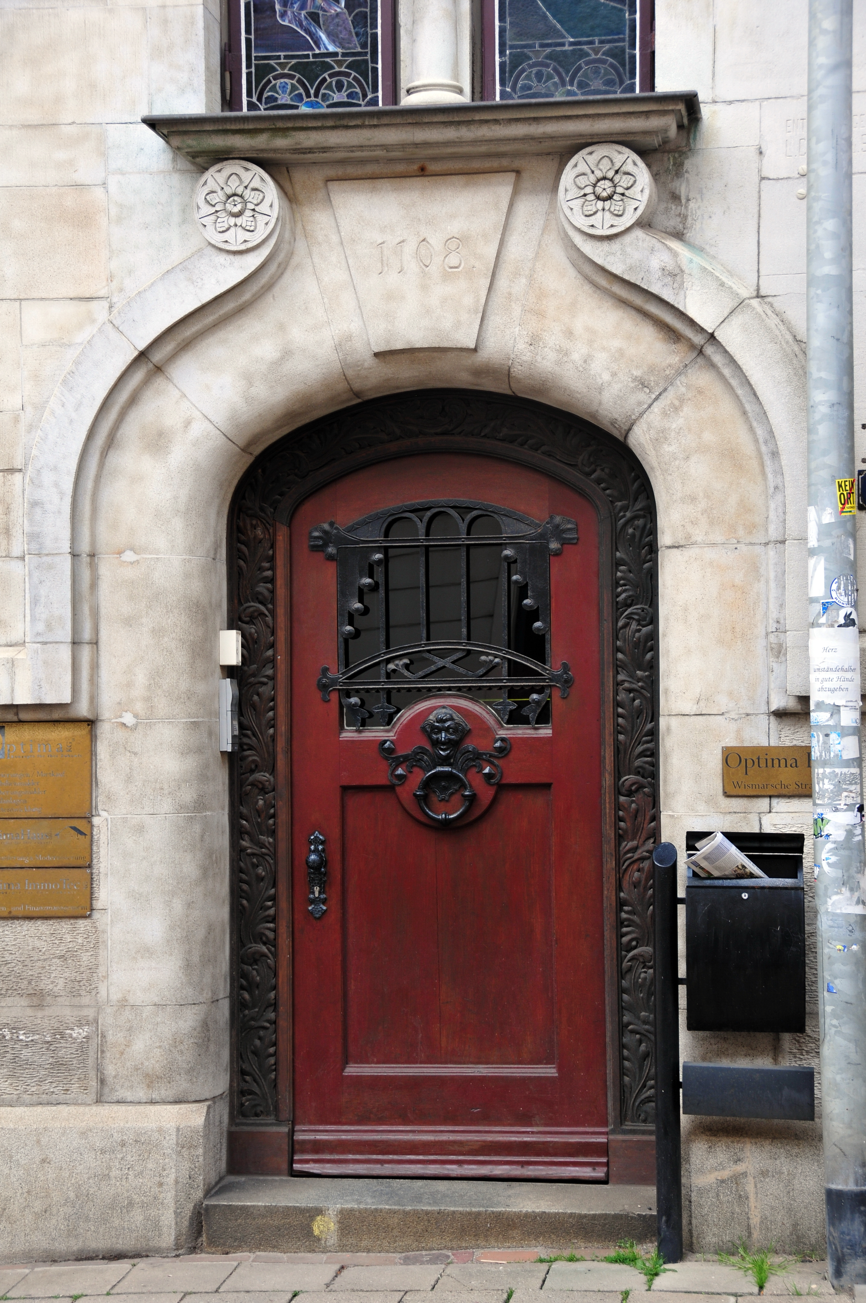 Die Eingangstür des Hauses Wismarsche Straße 141 in Schwerin in Mecklenburg-Vorpommern